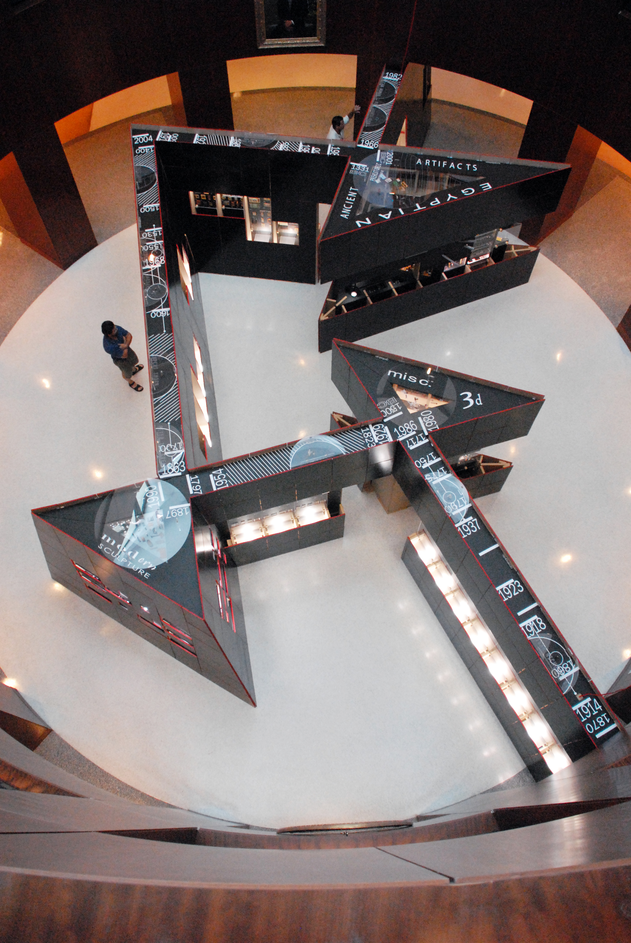 MINIMuseum